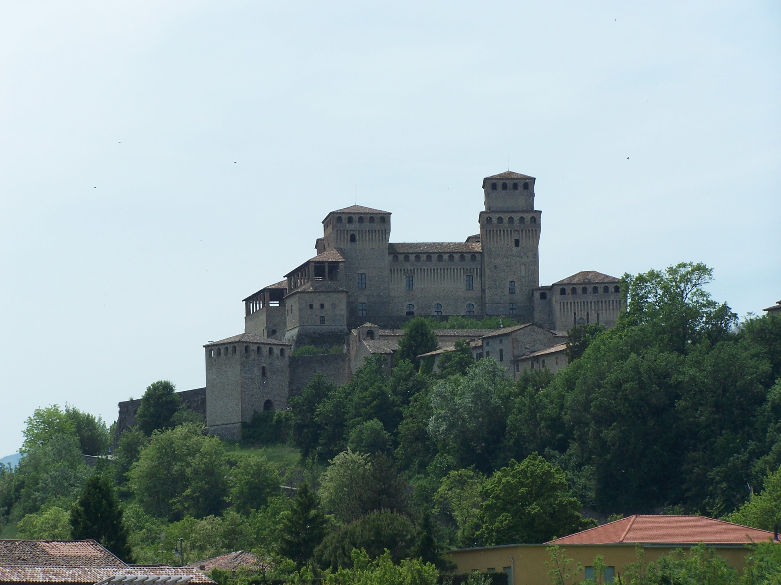 Castello di Torrechiara (esternamente il primo giro delle mura del castello, prima dell'entrata al portone d'ingresso) - MIBAC This is a photo of a monument which is part of cultural heritage of Italy.